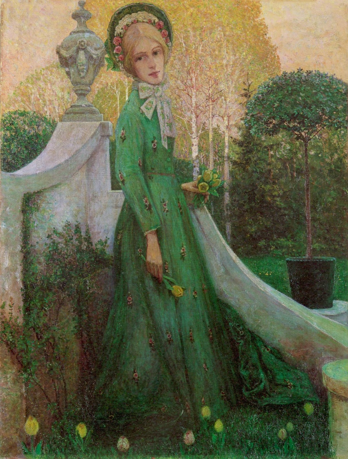 Porträt Martha Vogeler vor dem Barkenhoff.